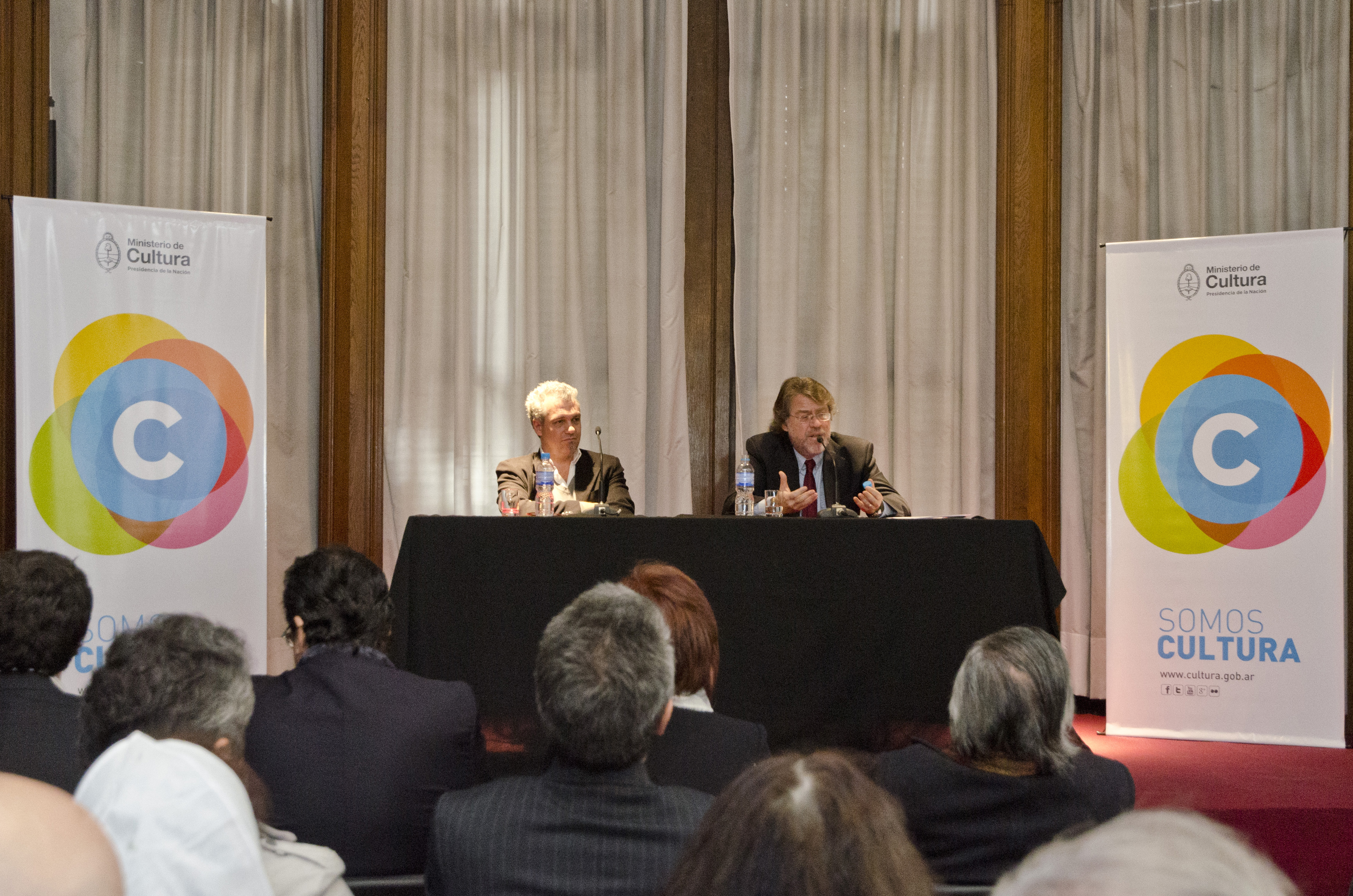 Buenos Aires, 16 de julio de 2014 - El secretario de Coordinación Estratégica para el Pensamiento Nacional, Ricardo Forster prsentó el programa de actividades 2014-2015 del área que encabeza en una conferencia de prensa. Como parte de las actividades del nuevo organismo, se organizarán encuentros regionales, debates, muestras, ediciones de libros y documentos que recuperen y potencien las mejores herencias, hitos y producciones de las tradiciones políticas argentinas. Fotos: Romina Santarelli / Ministerio de Cultura de la Nación.